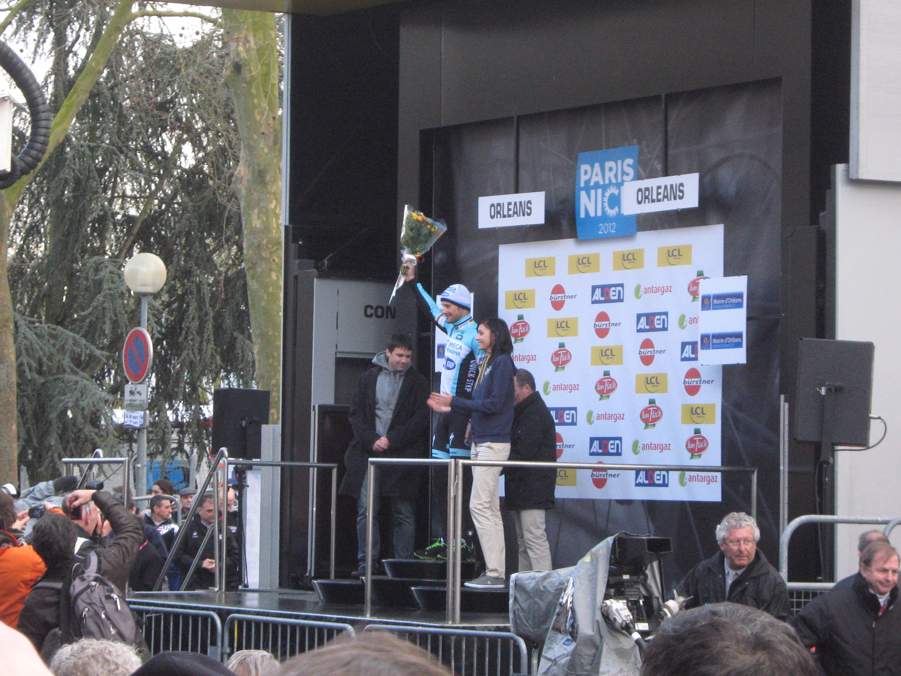 Paris-Nice 2012, 2e étape : Tom Boonen, vainqueur de l'étape, sur le podium